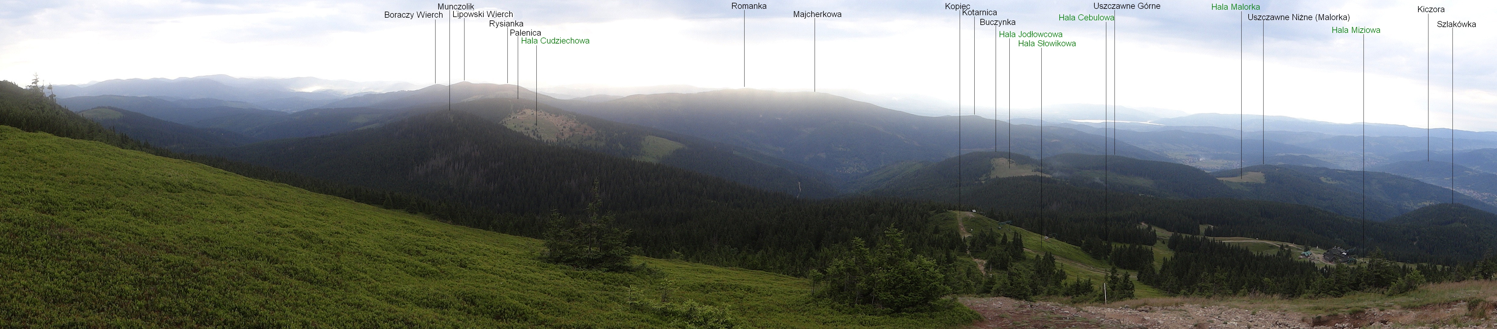 Panorama z Pilska na północną stronę